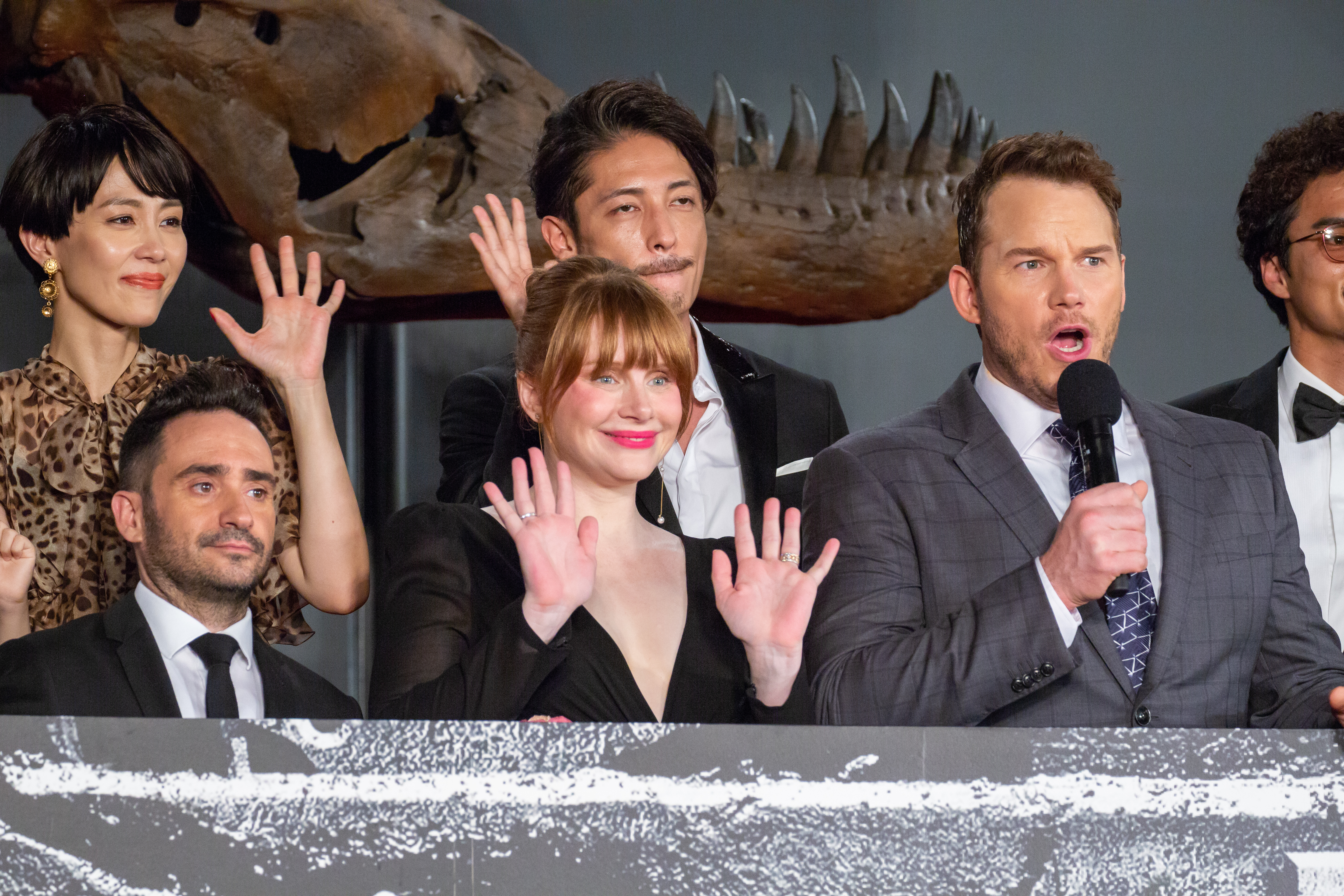 ジュラシック・ワールド/炎の王国 ジャパン・プレミア レッドカーペット J・A・バヨナ クリス・プラット ブライス・ダラス・ハワード